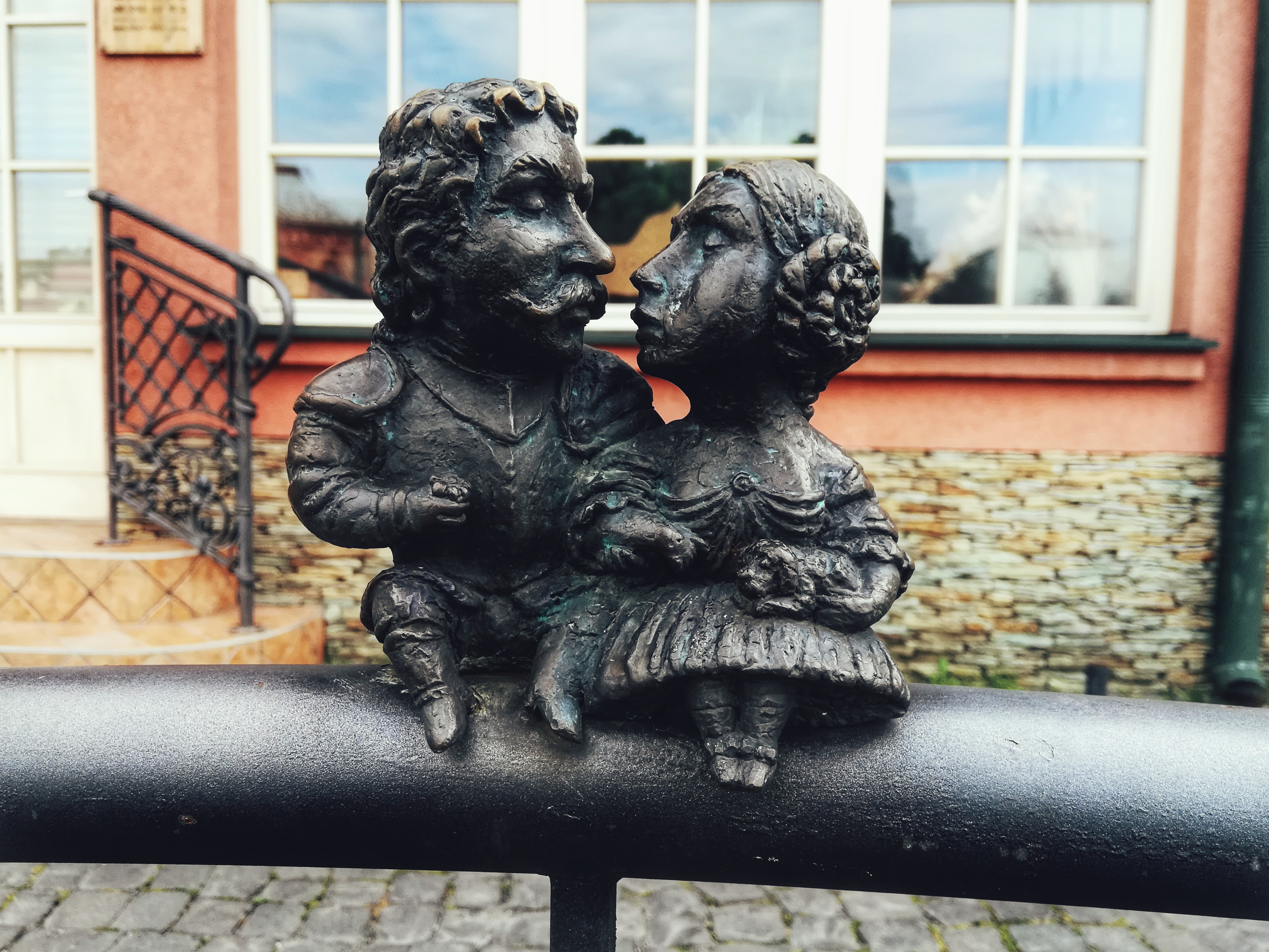 Міні скульптура "Крістіна Чакі та Міклош Берчені". Скульптор Михайло Колодко. Дата встановлення - 14 грудня 2015 року. Знаходиться на Православній набережній 5, неподалік Угорського посольства.